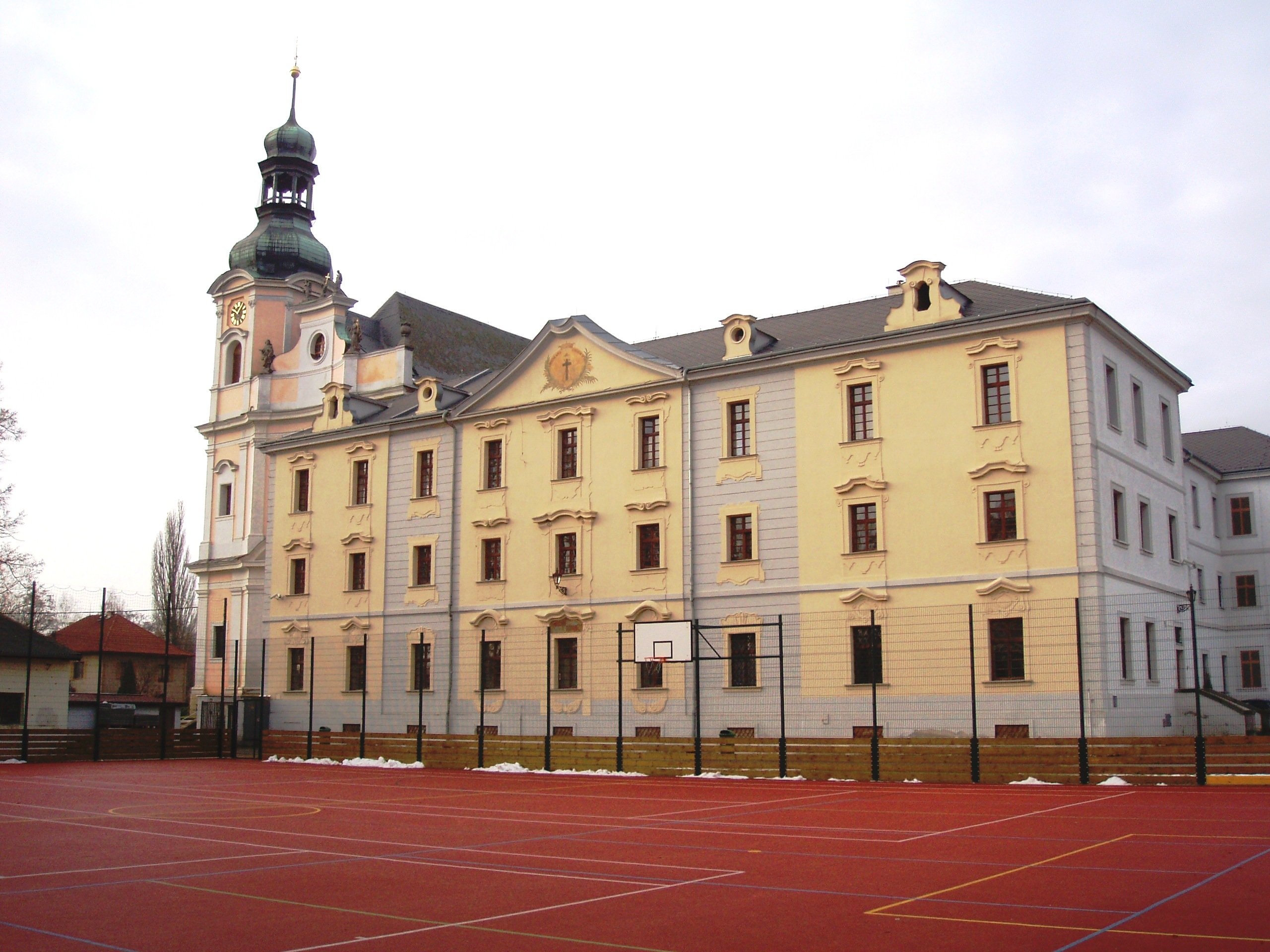 Obořiště-klášter Pavlánů,dnes polepšovna